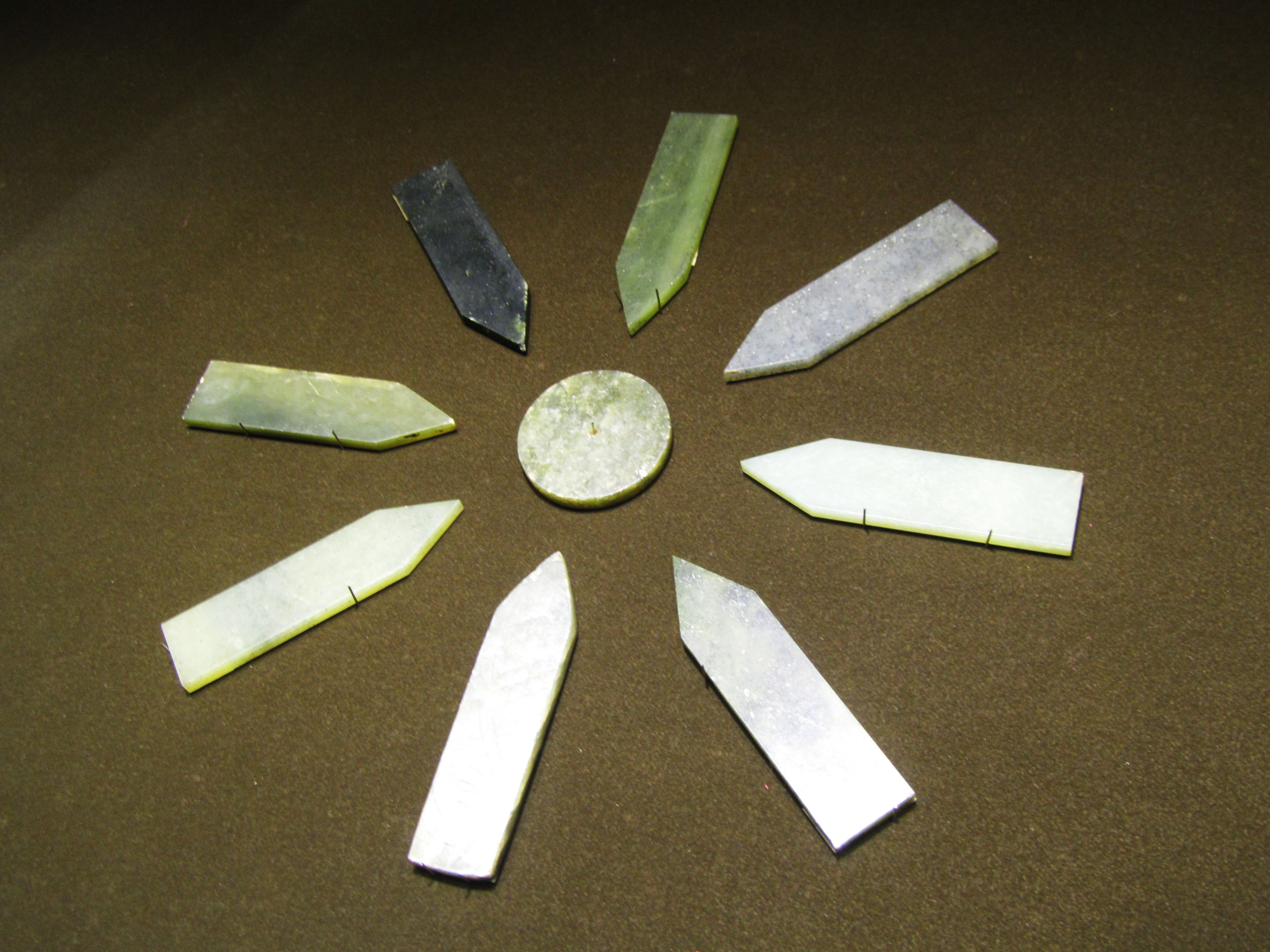 西汉玉圭，咸阳市窑店镇采集。